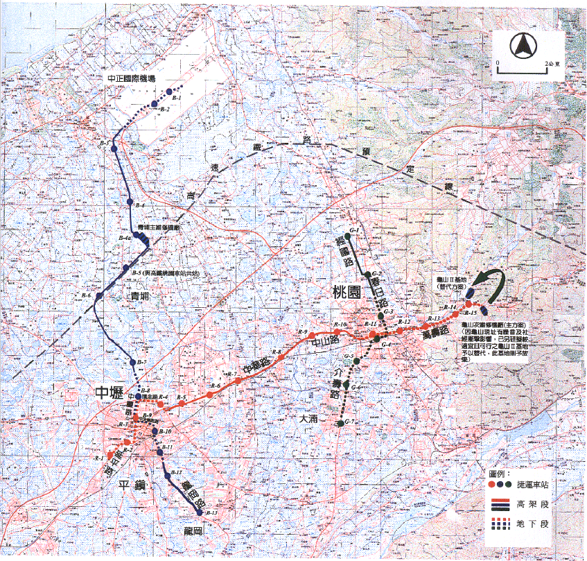 2000年由交通部高速鐵路工程局規畫的桃園捷運路網